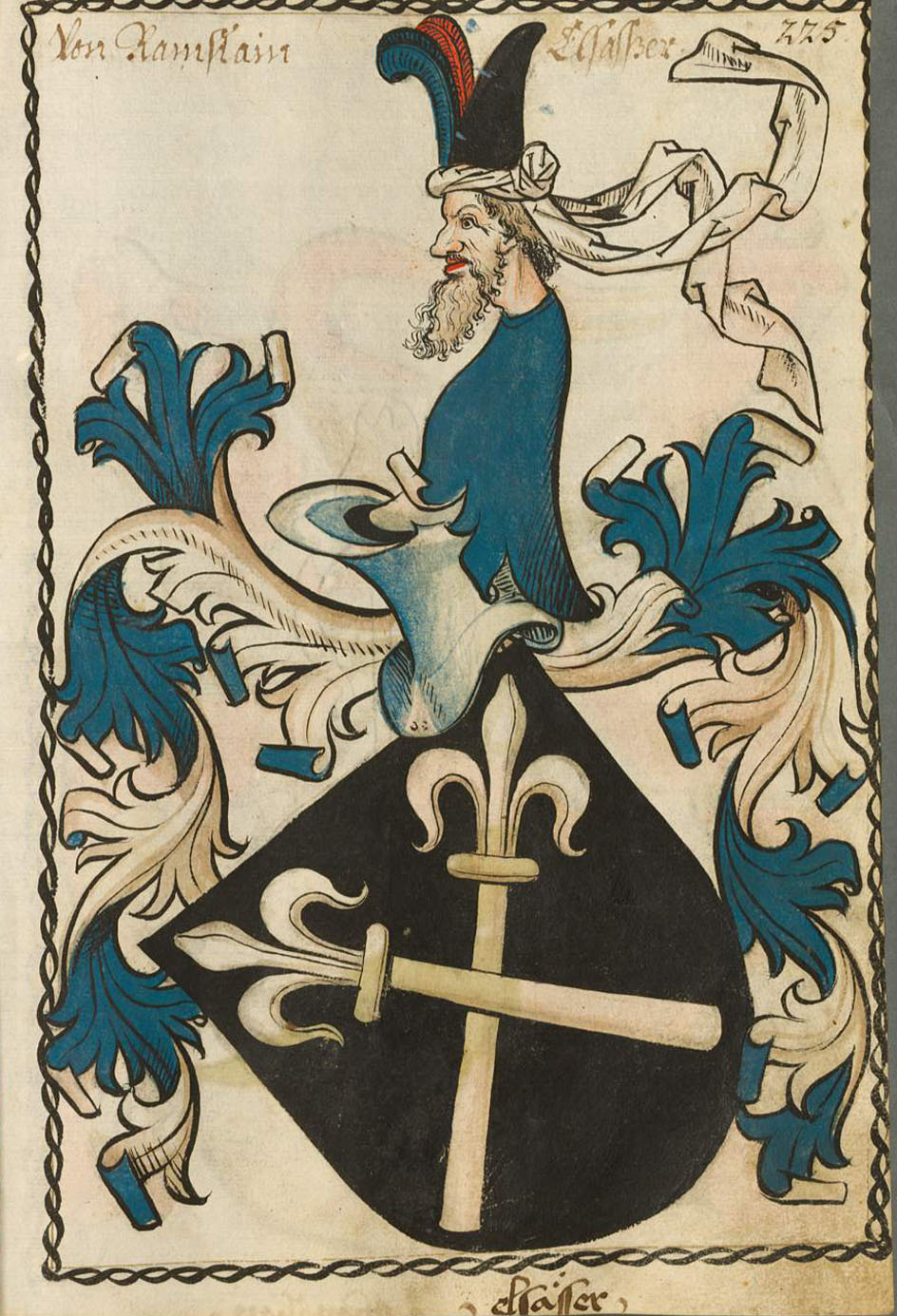 Scheibler'sches Wappenbuch , älterer Teil Elsässer Seite 225